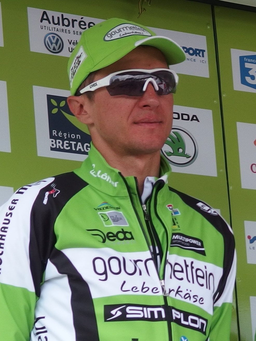 Tour de Bretagne 2014 - Présentation des équipes au départ de la sixième étape à Radenac - Équipe Gourmetfein Simplon Wels Depicted person: Matija Kvasina